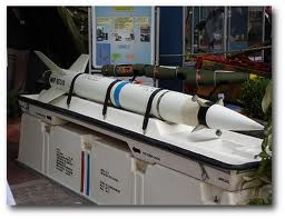 es un misil